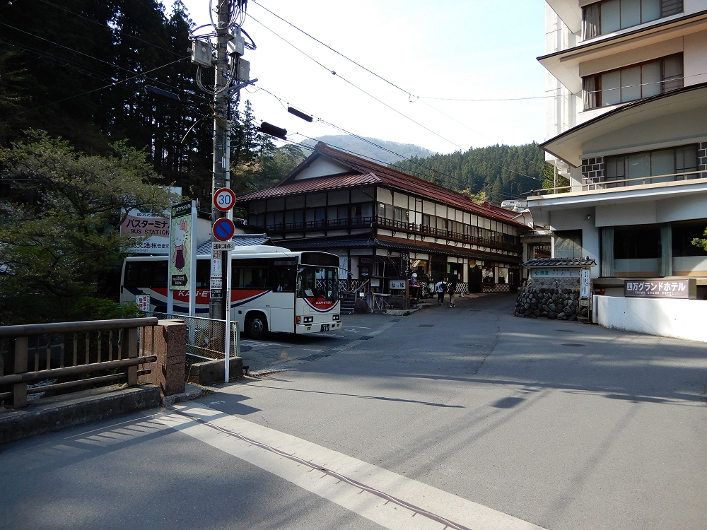 四万温泉バス停